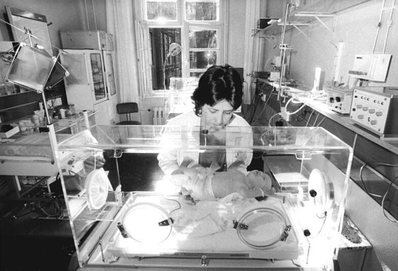 Berlin, Krankenhaus "Oskar-Ziethen", Kinderkrankenhaus ADN-ZB Roeske 12.7.89 Berlin: Lisa Reimann ist erst einen Tag alt und läßt sich im Oskar-Ziethen-Krankenhaus von Dr. Carmen Herlinghaus, Stationsärztin der Abteilung Neonatologie des Kinderkrankenhauses Lindenhof, versorgen. Auf jeden Fall aber kommt auch die Kleine in den Genuß der Ergebnisse der Rekonstruktionsarbeiten in der bekannten Frauenklinik der Hauptstadt. Über zwei Jahre lang war ein tolerantes Miteinander von Mitarbeitern, Patienten und Bauschaffenden erforderlich, um bei laufendem Stationsbetrieb die erforderlichen Arbeitern zu garantieren.